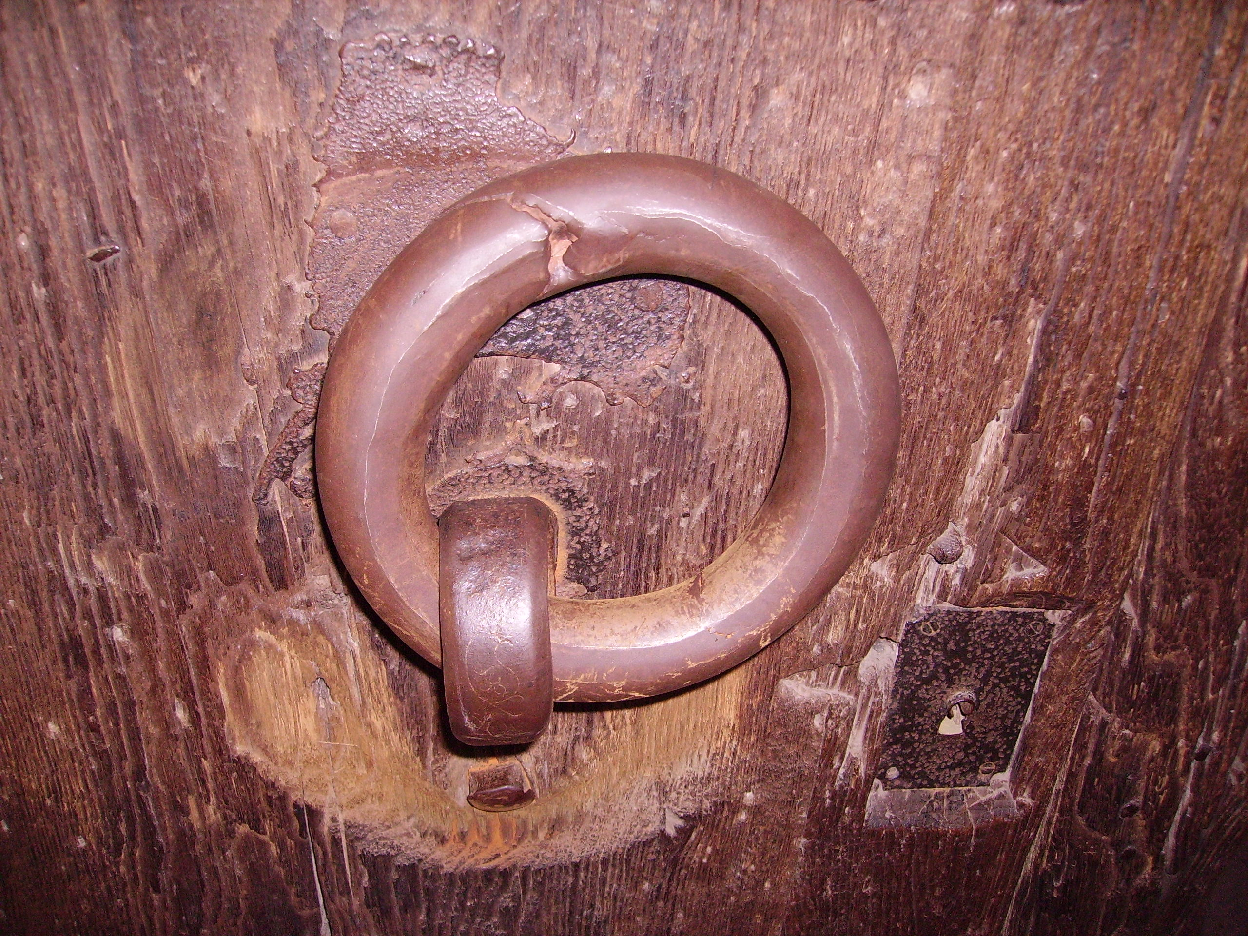 view of Heidelberg Castle